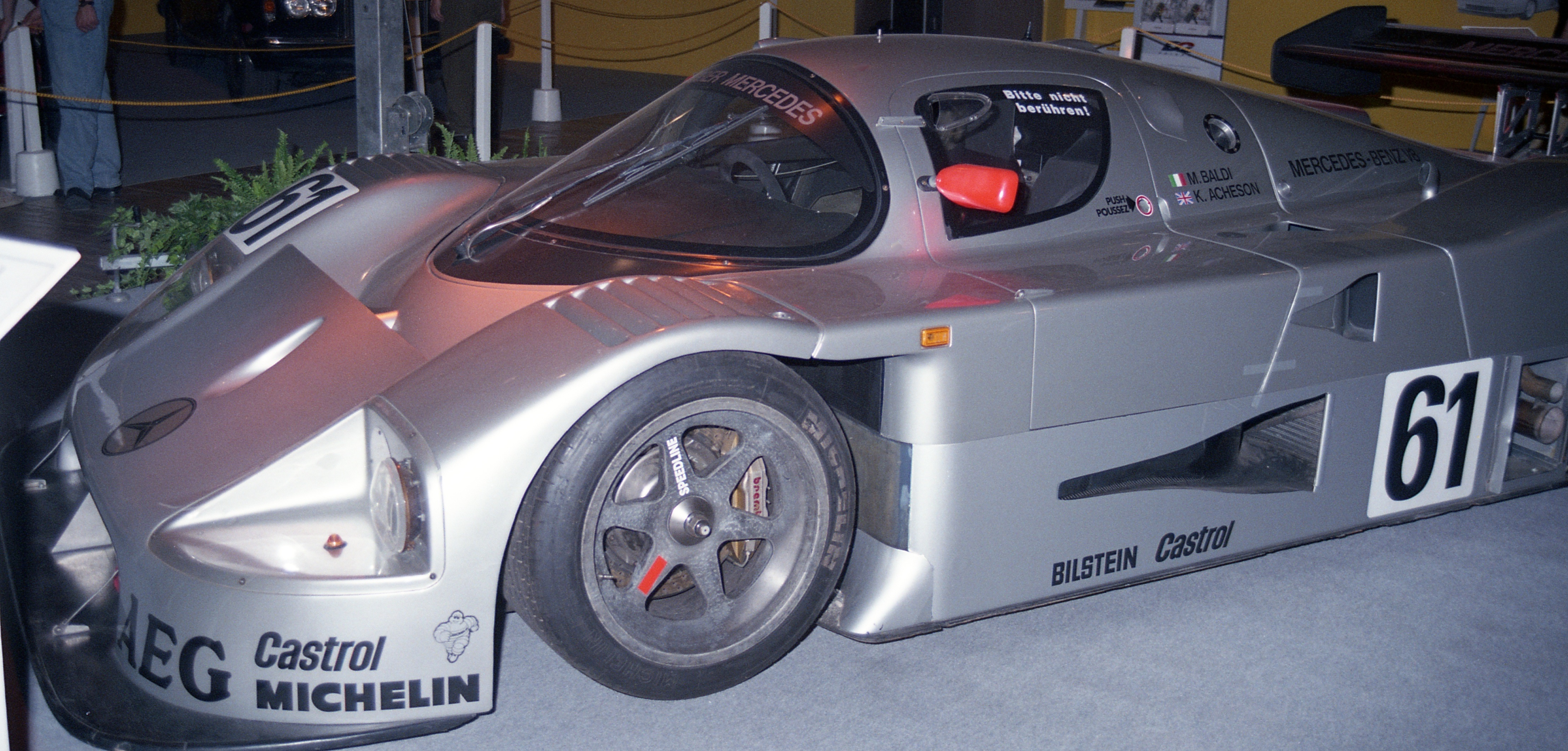 Sauber-Mercedes C9, Startnummer 61, Mauro Baldi, Kenny Acheson